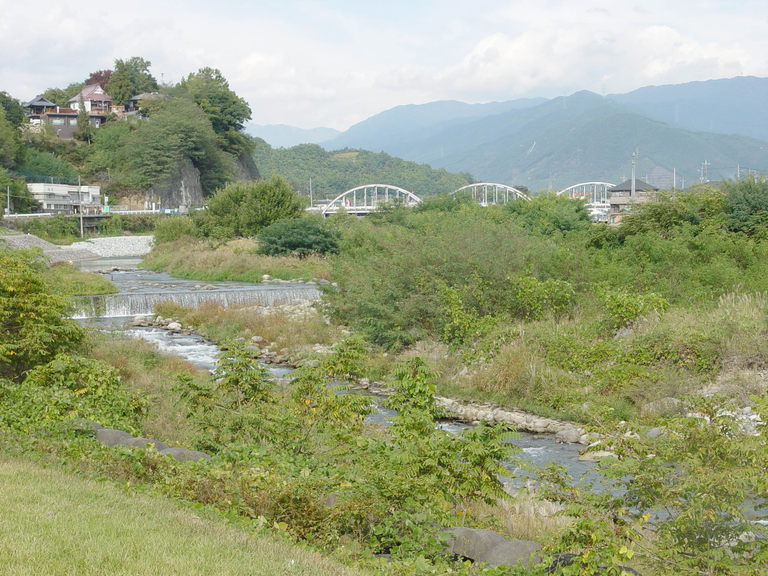 Fuefuki River, Yamanashi, Yamanashi, Japan山梨市笛吹川